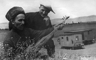 Трактористы Орджоникидзевской МТС Д.Лукман и И.Баудин в часы отдыха Чечено-Ингушетия